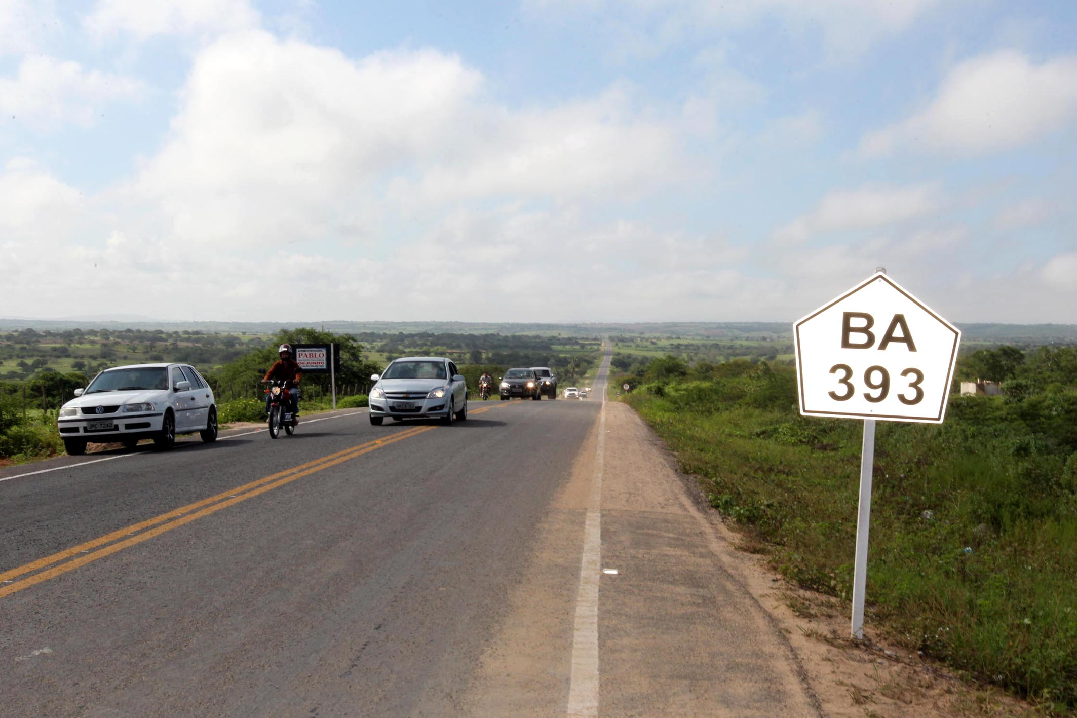 Governador Jaques Wagner inaugura trechos recuperados da BA 393 no município de Heliópolis. Foto: Manu Dias/SECOM